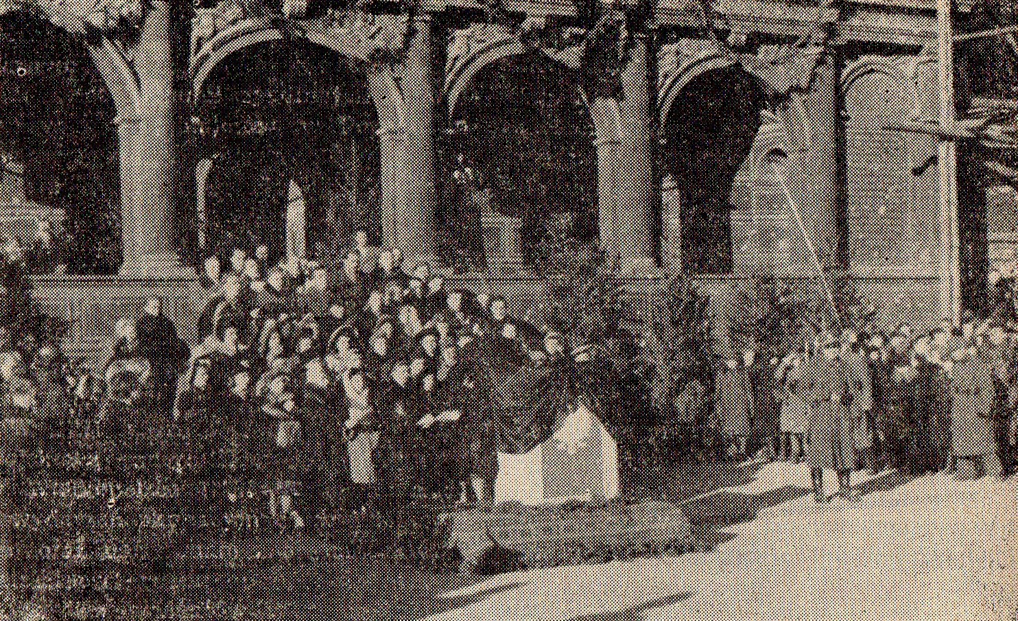 Pogrzeb Feliksa Nowowiejskiego w Poznaniu - 22 stycznia 1946 (ratusz).